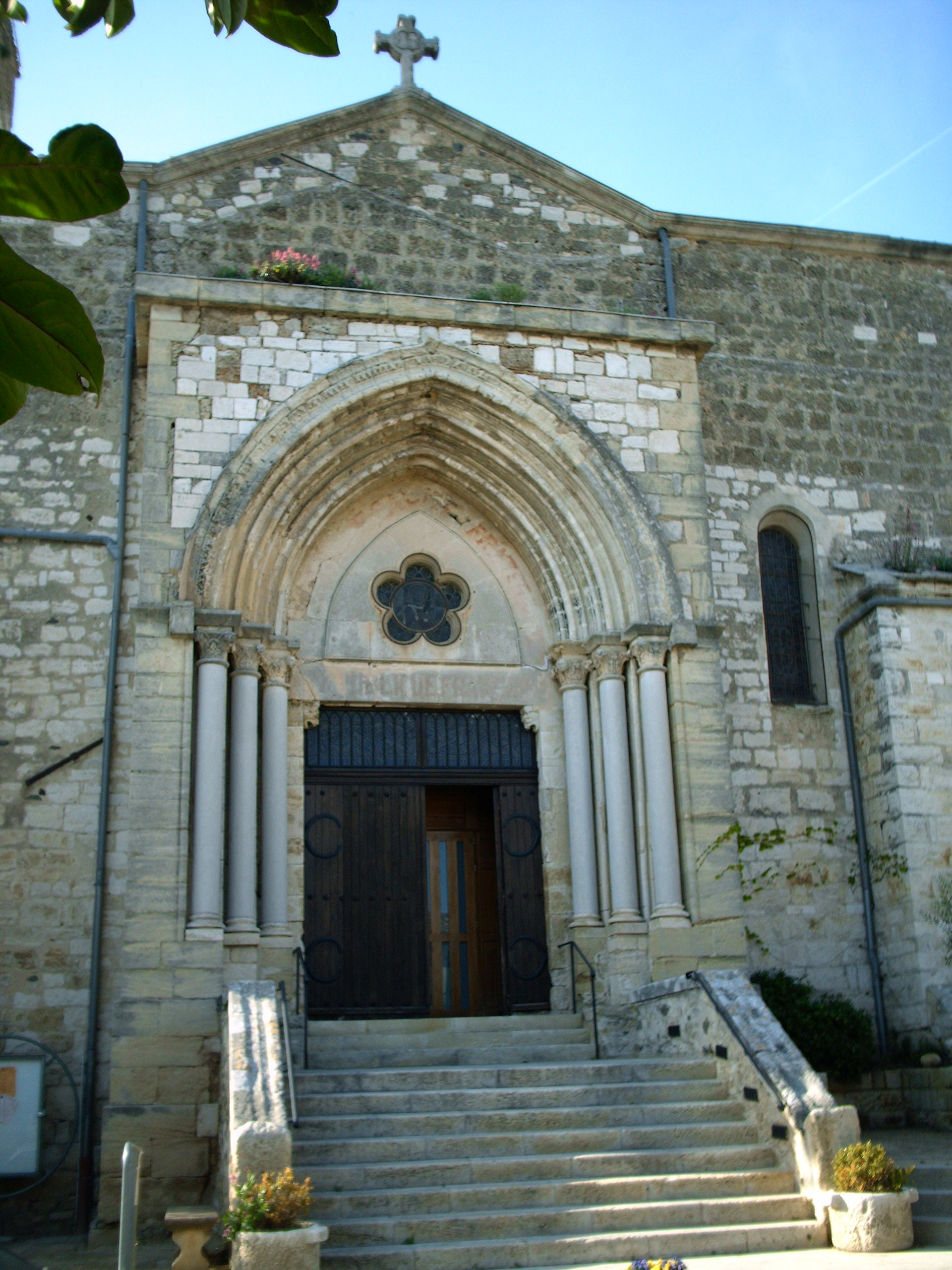 Église Saint-Étienne de Montferrier-sur-Lez (Hérault)